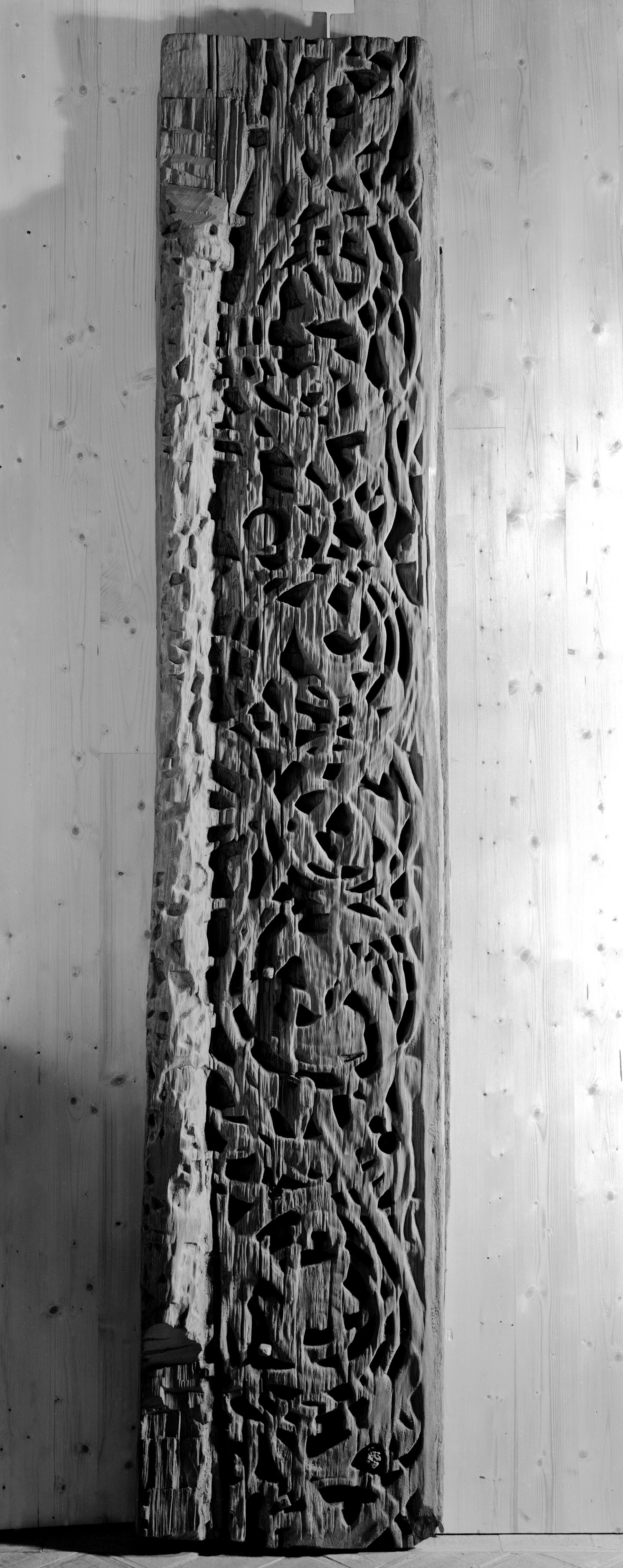 Portalplanke fra Imshaug kirke i Sørum, Akershus. Museumsnummer hos Kulturhistorisk museum: C21999.